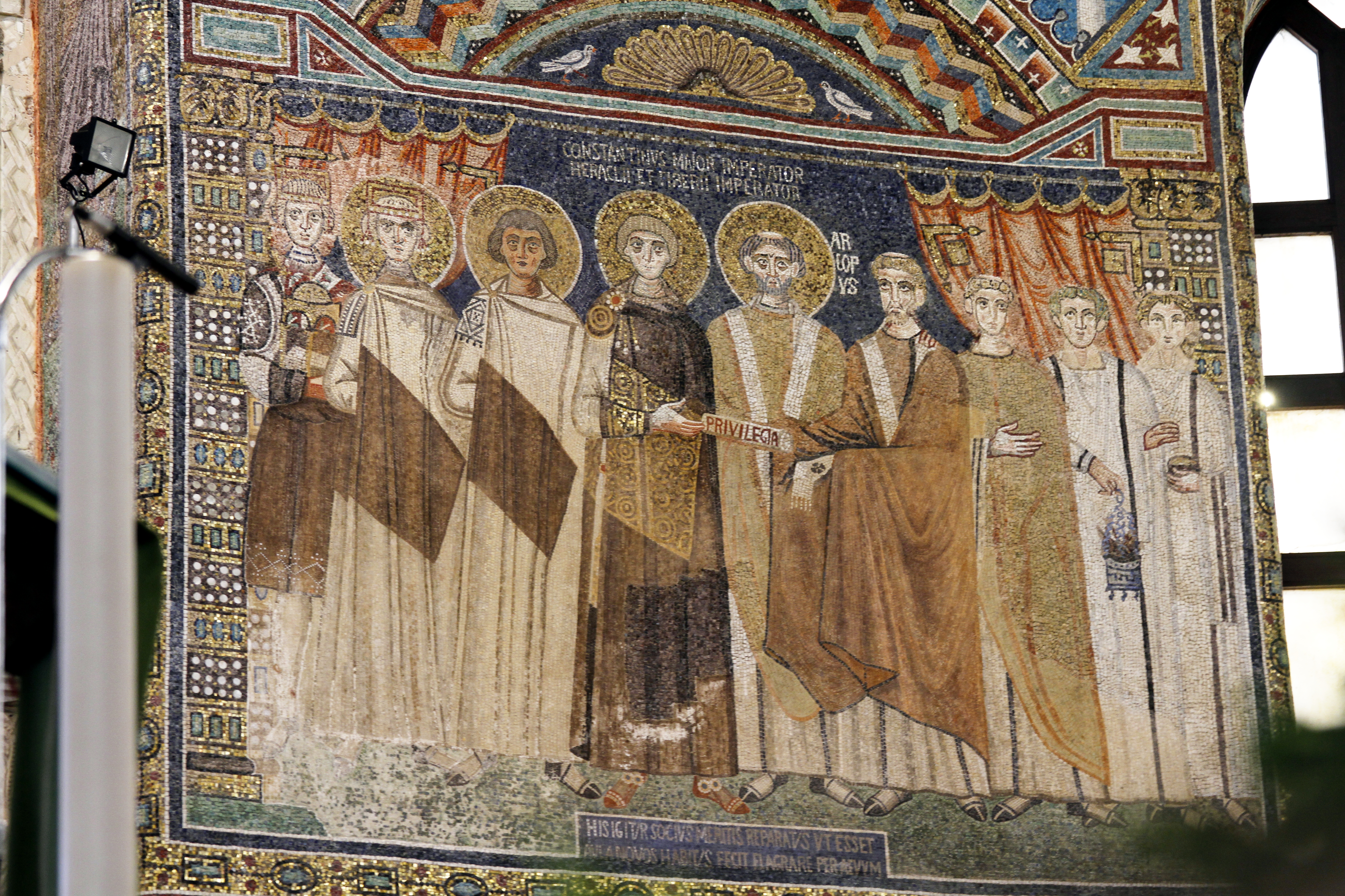 Sant'Apollinare in Classe - Ravenna